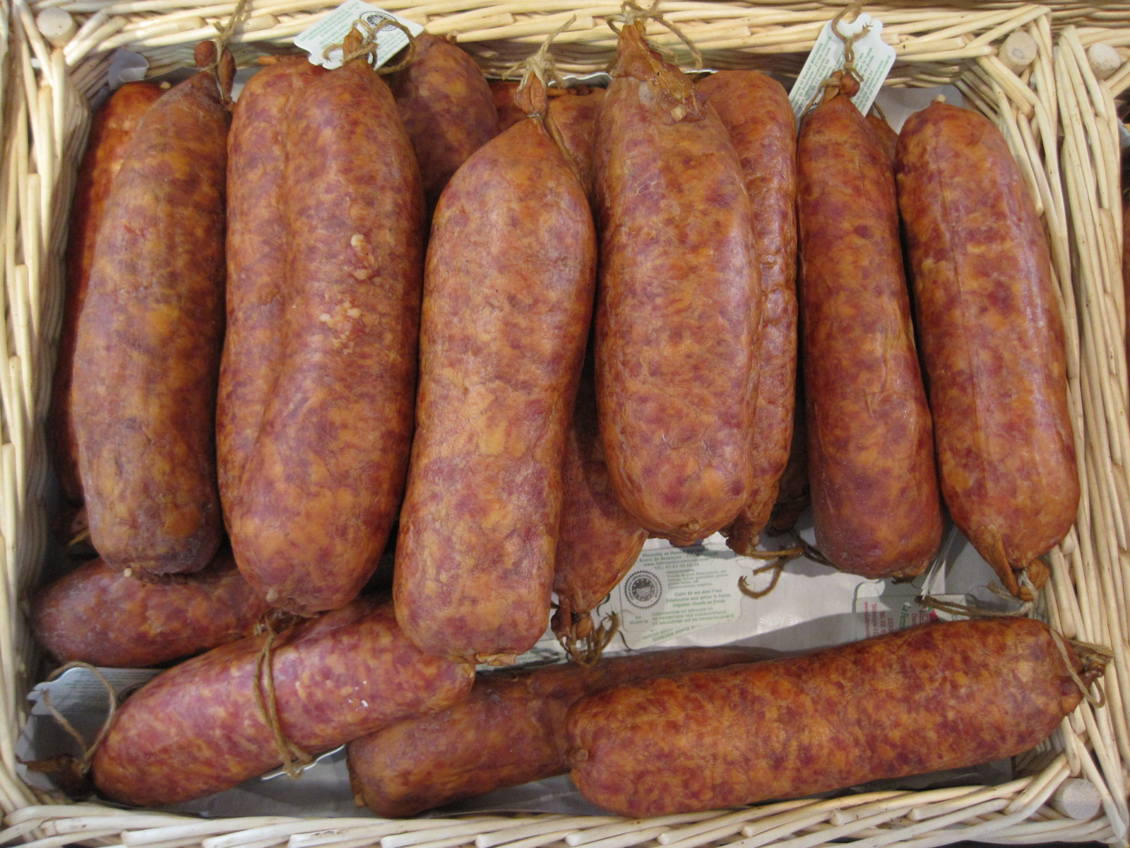 Saucisse de Morteau